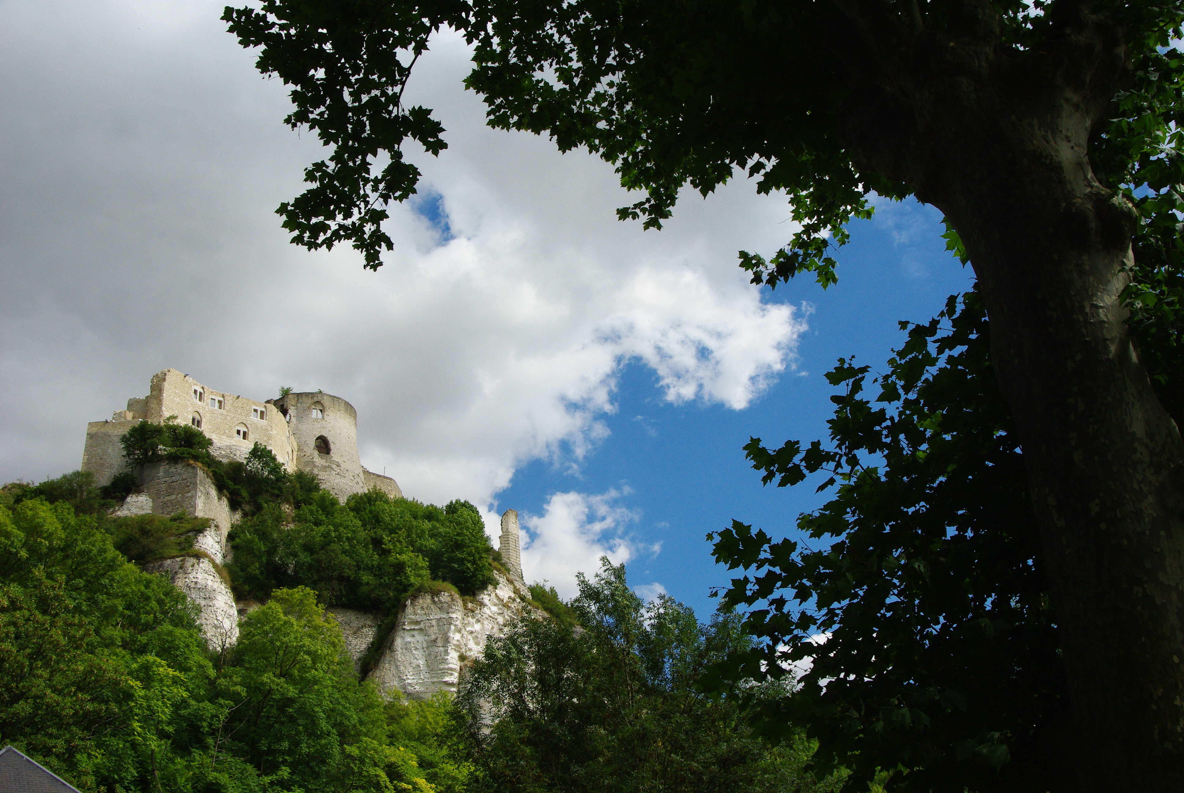 Château Gaillard vu des bords de Seine. .